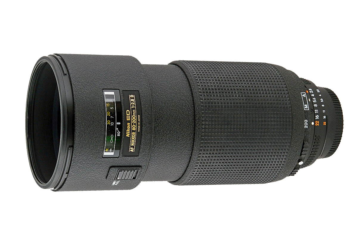 AI AF Zoom-Nikkor 80-200mm f/2.8D ED MKII (1992 - 1997)